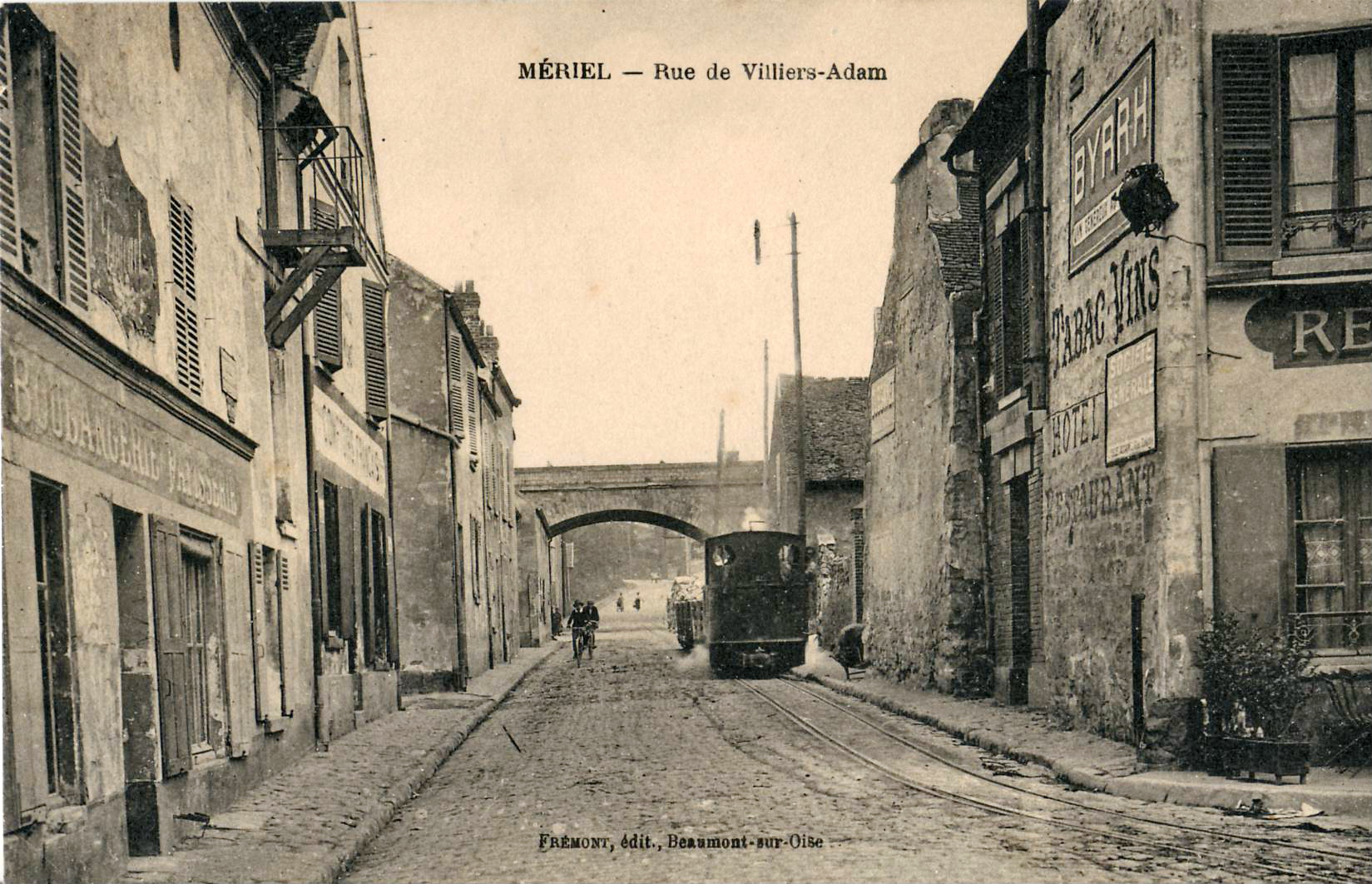 Carte postale ancienne éditée par Frémont à Beaumont-sur-Oise :MÉRIEL - Rue de Villiers-AdamTrain de fret des plâtrières de Mériel et de Villiers-Adam